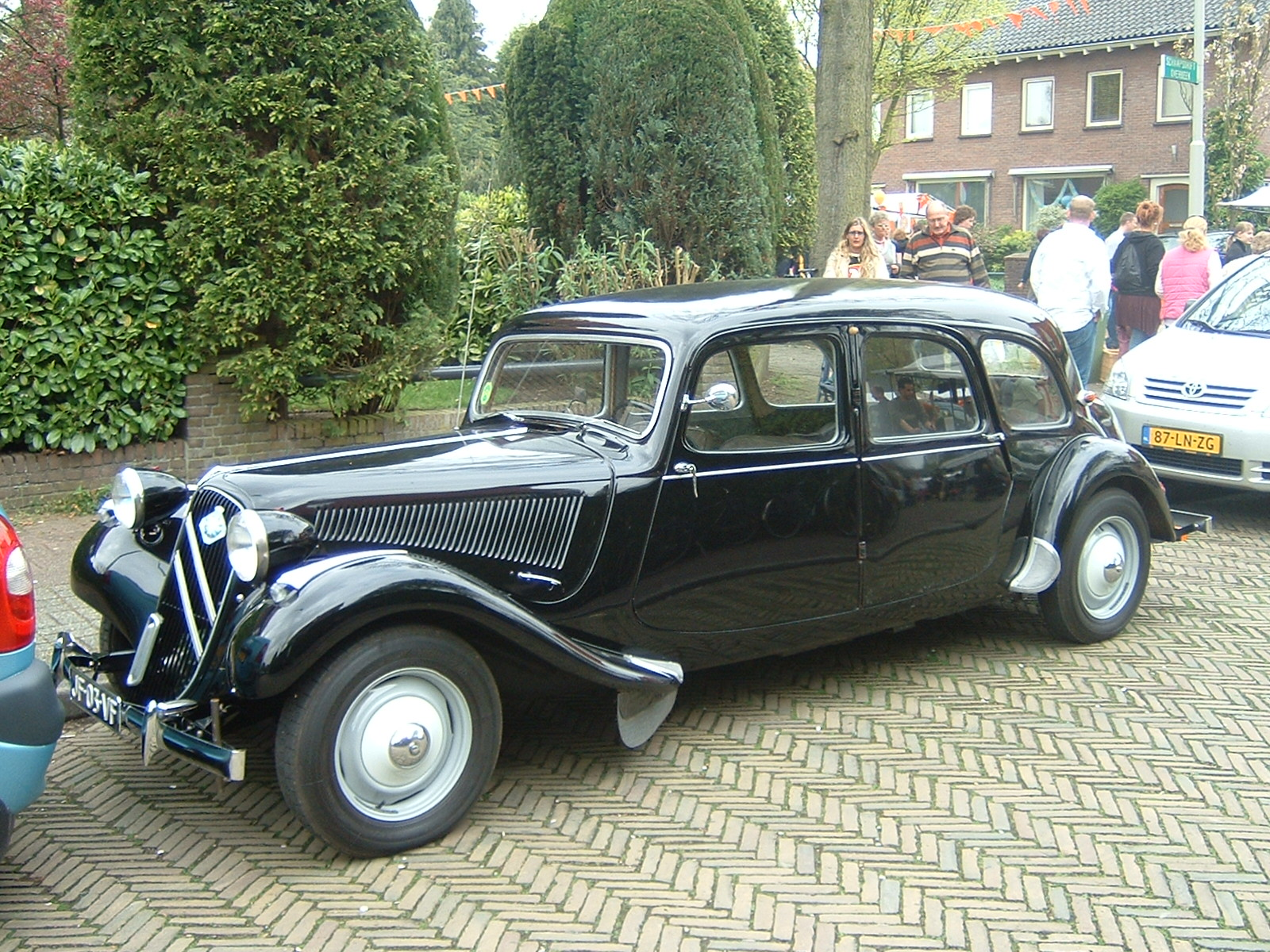 Citroën traction avant 11 familiale. Foto gemaakt op Koninginnedag 2005 in Velp (Gld) Categorie:Afbeelding auto